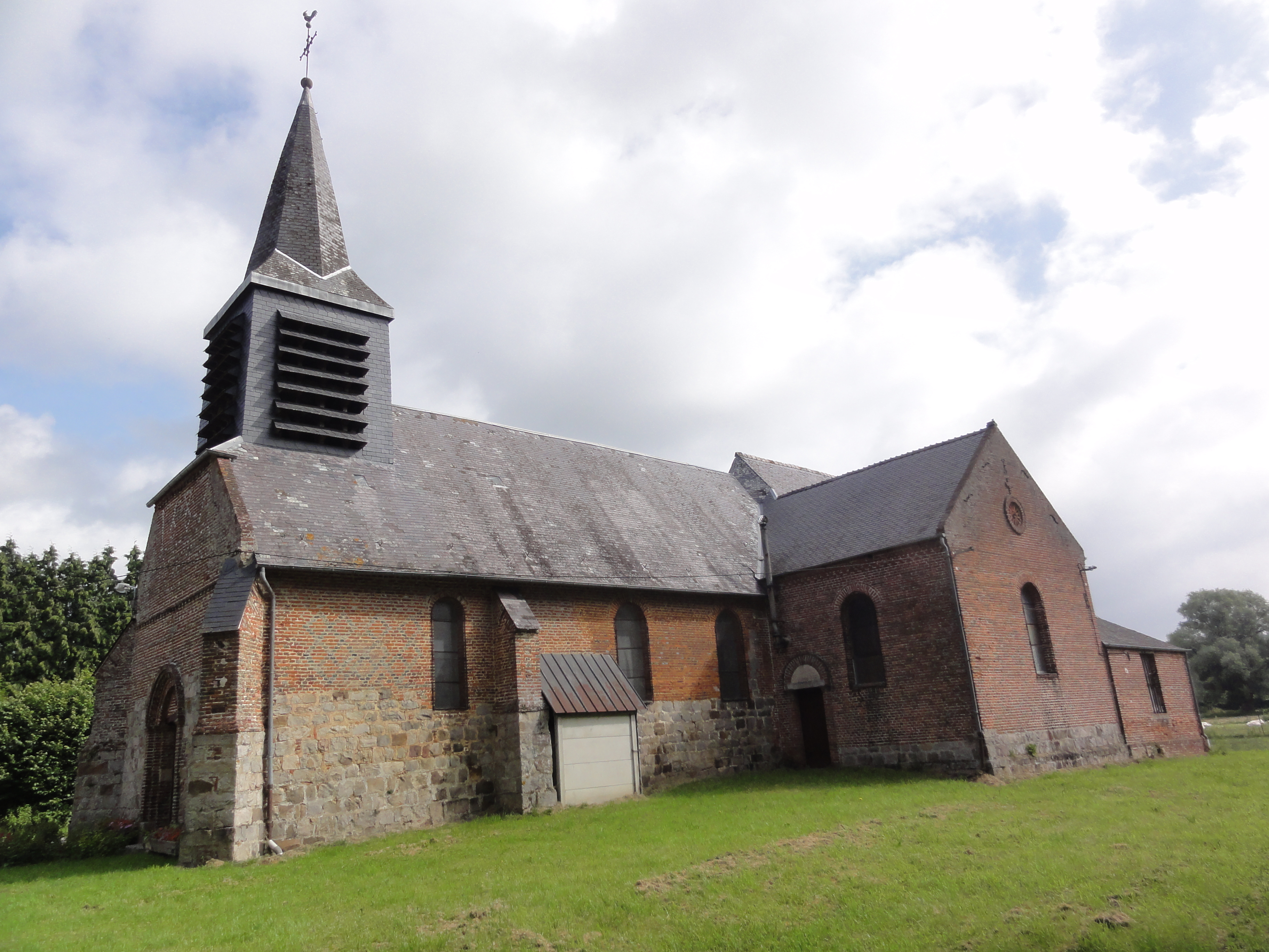 Erloy (Aisne) église Sainte-Eugénie